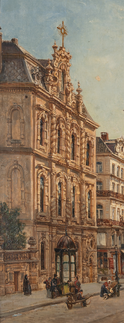 Cette image est une vue partielle du tableau "Boulevard du Nord" de Gustave Walckiers (1831-1891) datant probablement des années 1880 à 1890